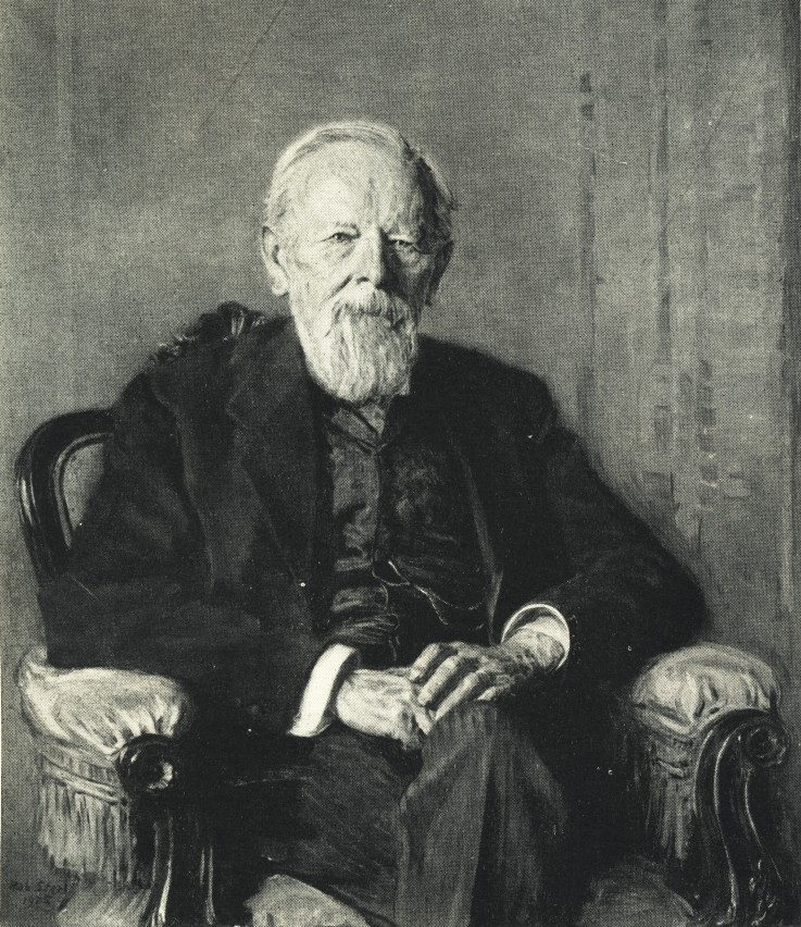 Bildnis des Politikers Paul W. Vogel